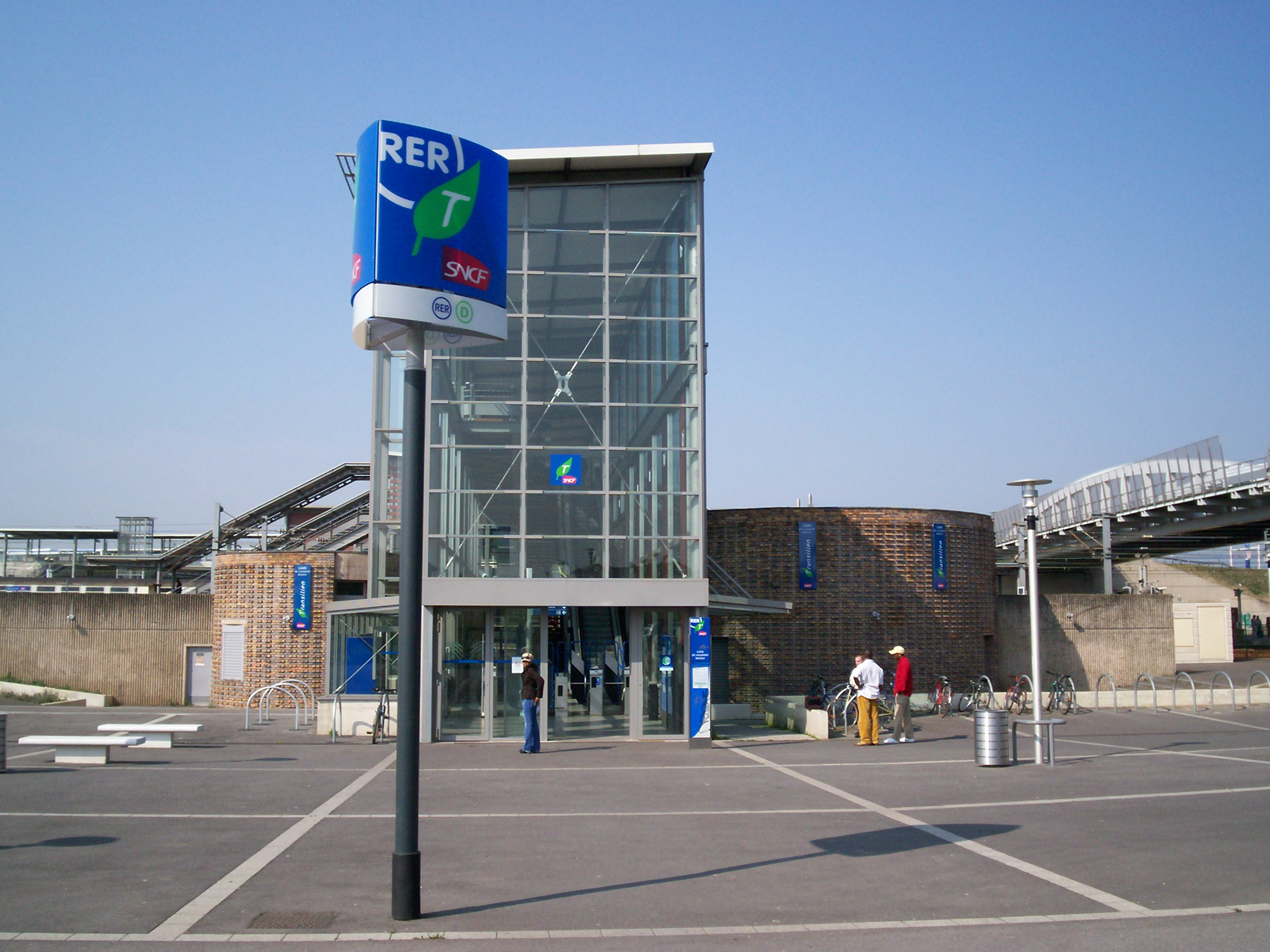 Vue du bâtiment voyageurs côté Moissy-Cramayel